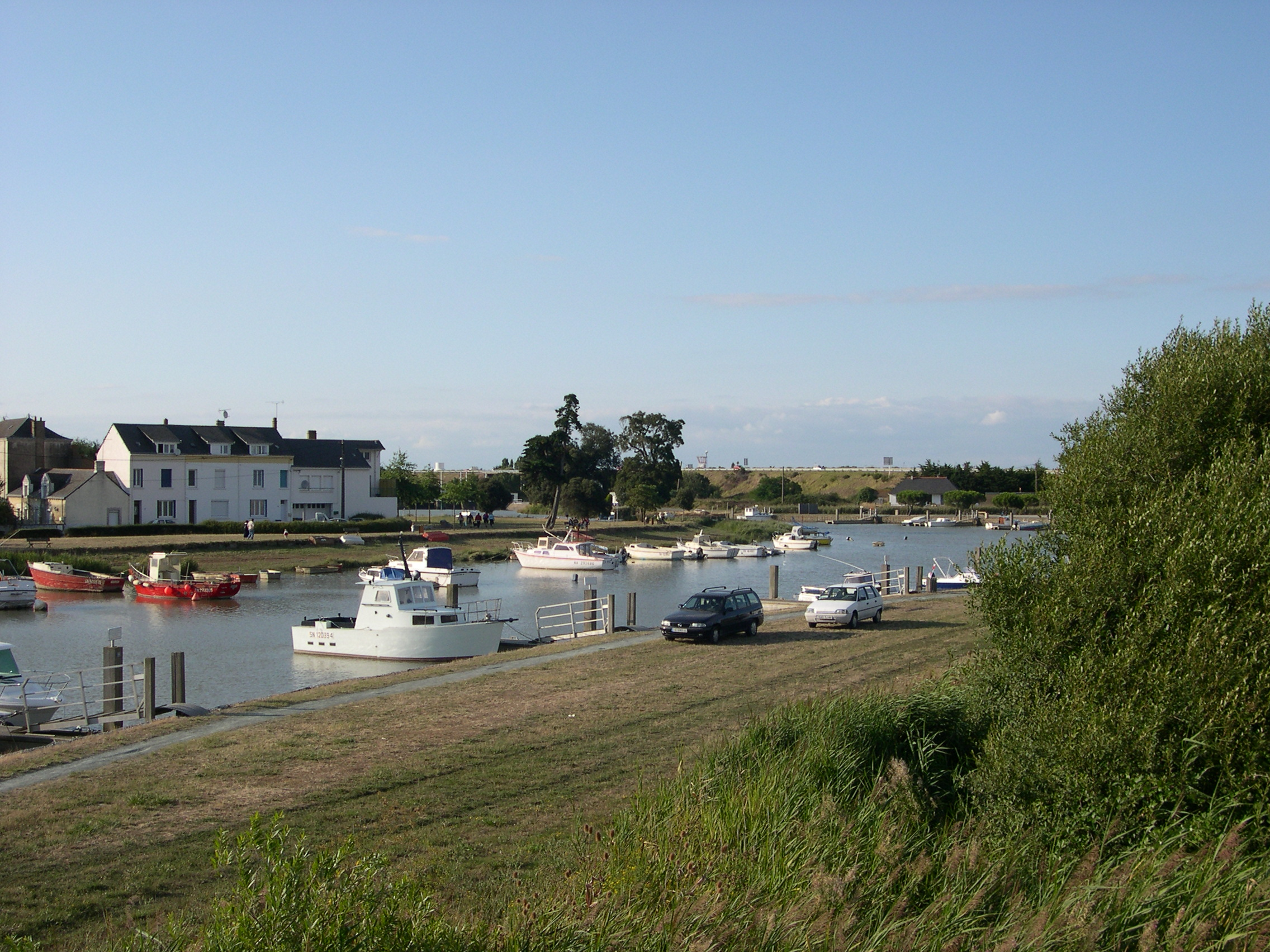 Le Brivet rivière de Loire-Atlantique France